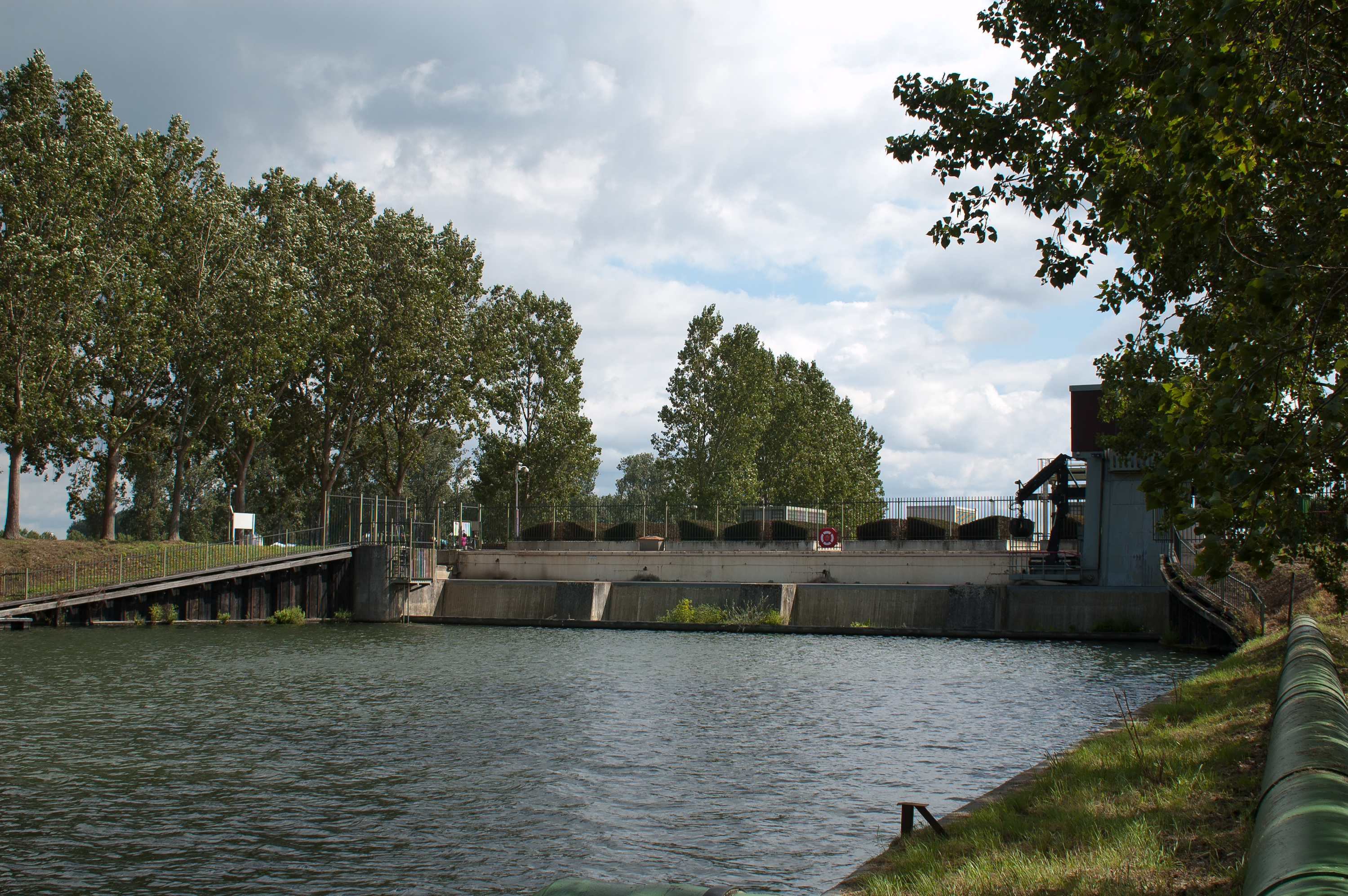 Das Wasserkraftwerk (Waterkrachtcentrale) Linne des Essent-Konzerns am Stau Linne der Maas zwischen Linne und Heel. Blick auf die Oberwasserseite. Das grüne Rohr am rechten Bildrand gehört zu einer Fischleitanlage, die verhindern soll, dass Fische in die Turbinen gelangen. Zum Kraftwerk: Vier Meter Fallhöhe, vier Kaplan-Turbinen, Jahresleistung 35 Millionen Kilowattstunden, Baujahr 1987 - 1989